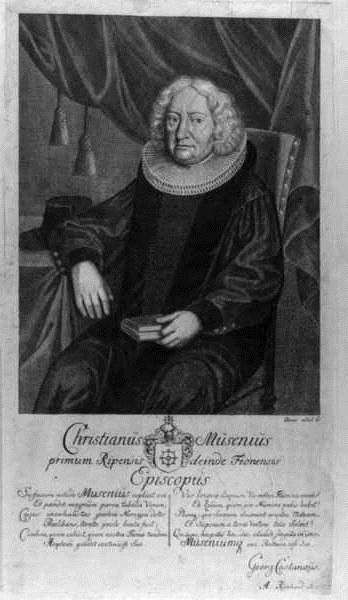 Christian Muus (1656-1717), dansk-norsk teolog. Sogneprest i Oslo domkirke, Christiania (Oslo, Norge) og biskop i Ribe og Odense i Danmark.